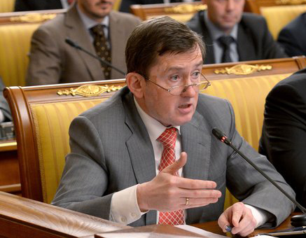 Член Экспертного совета при правительстве РФ Александр Починок